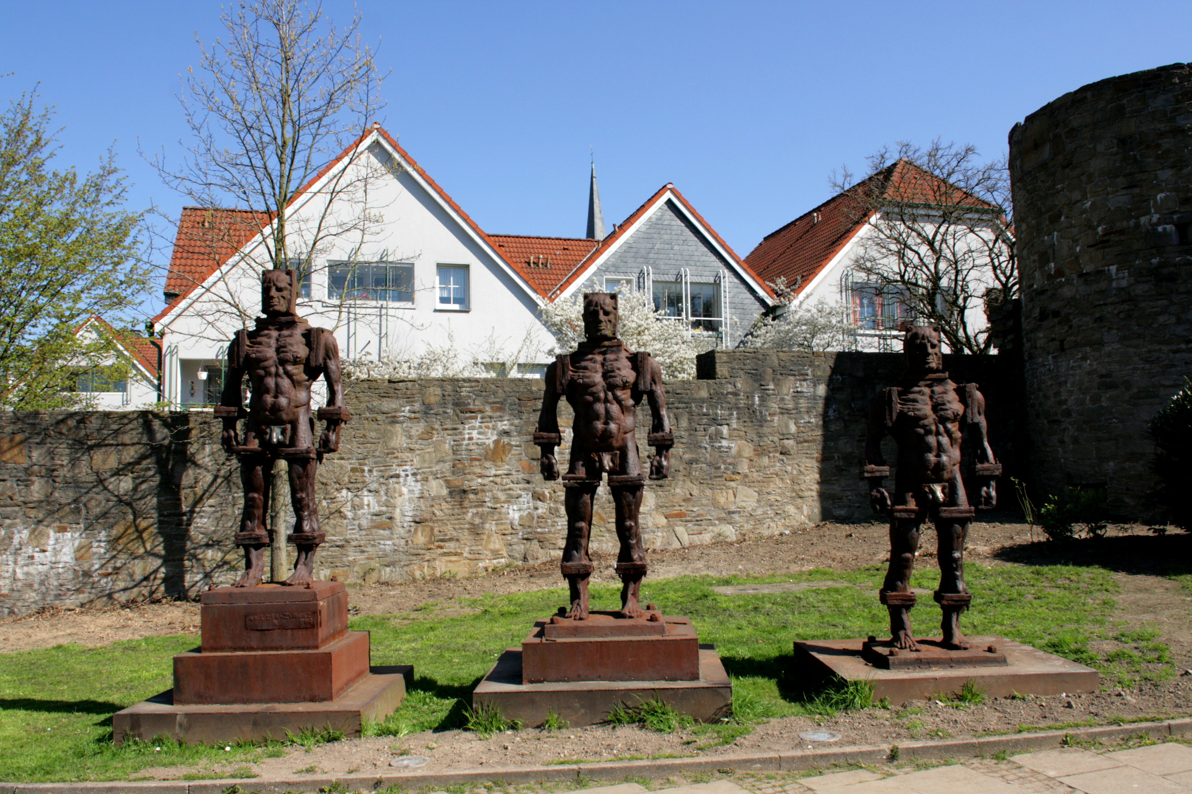 Menschen aus Eisen von Zbigniew Fraczkiewicz an der Martin-Luther-Straße in Hattingen